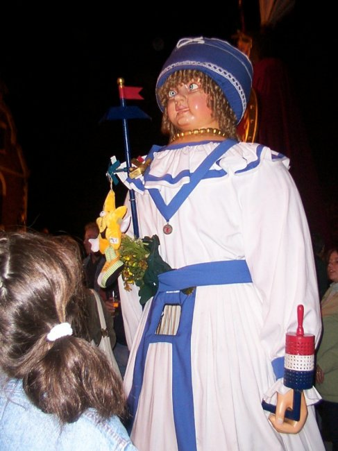 Bimbin lors de la rentrée des géants / Bimbin le "youngest among Douai giants giong home at night